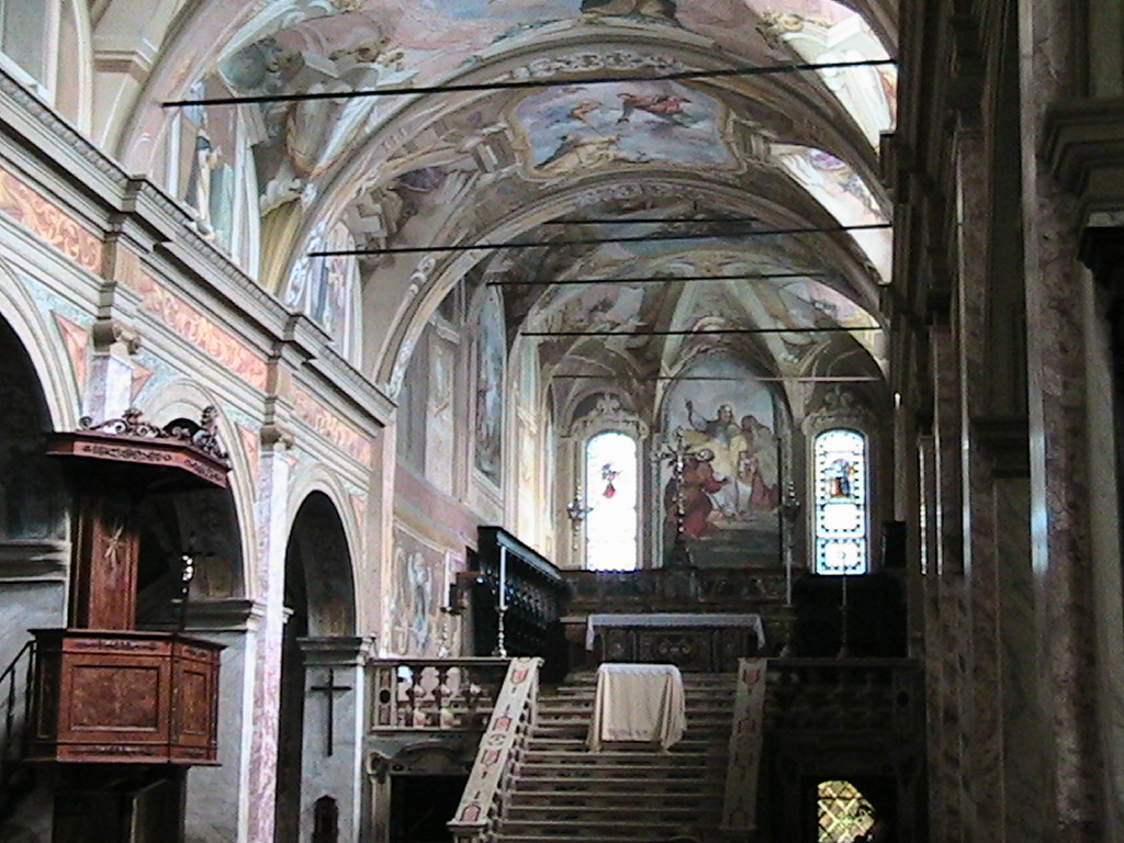 Soncino - Chiesa di San Giacomo - interno